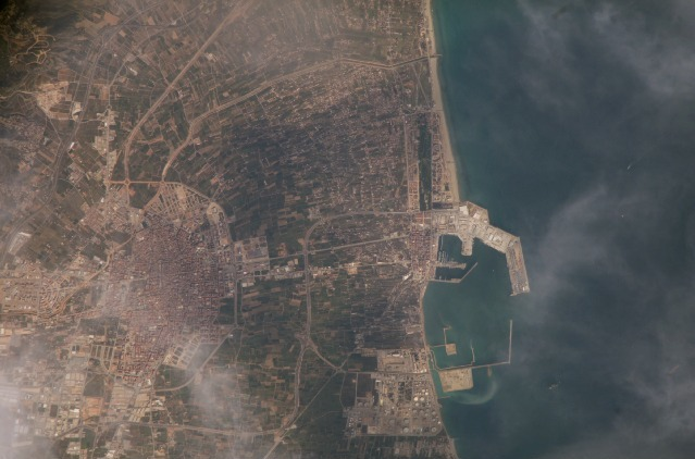 Vista aerea de Castellón de la Plana, el Grao, el Puerto y la Marjalería de esta ciudad de España